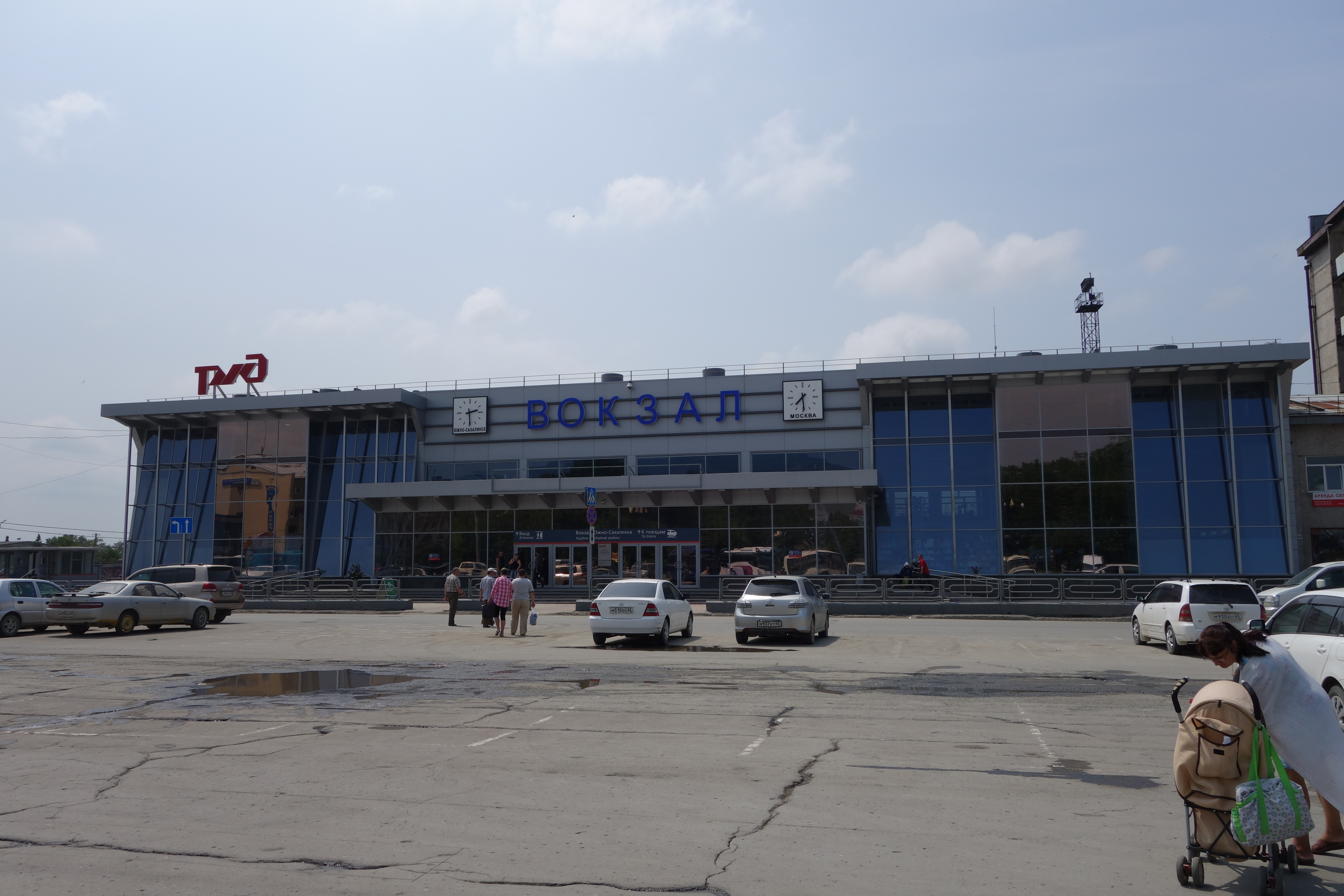 Железнодорожный вокзал. Южно-Сахалинск.